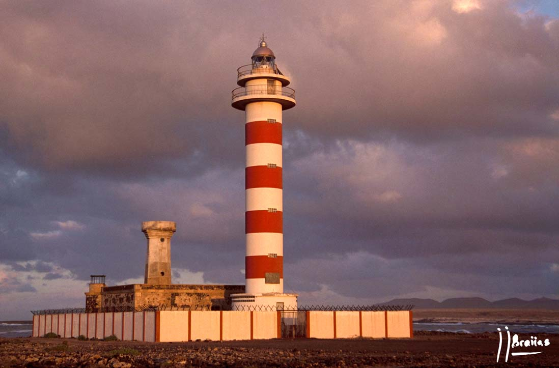 faro de el Cotillo